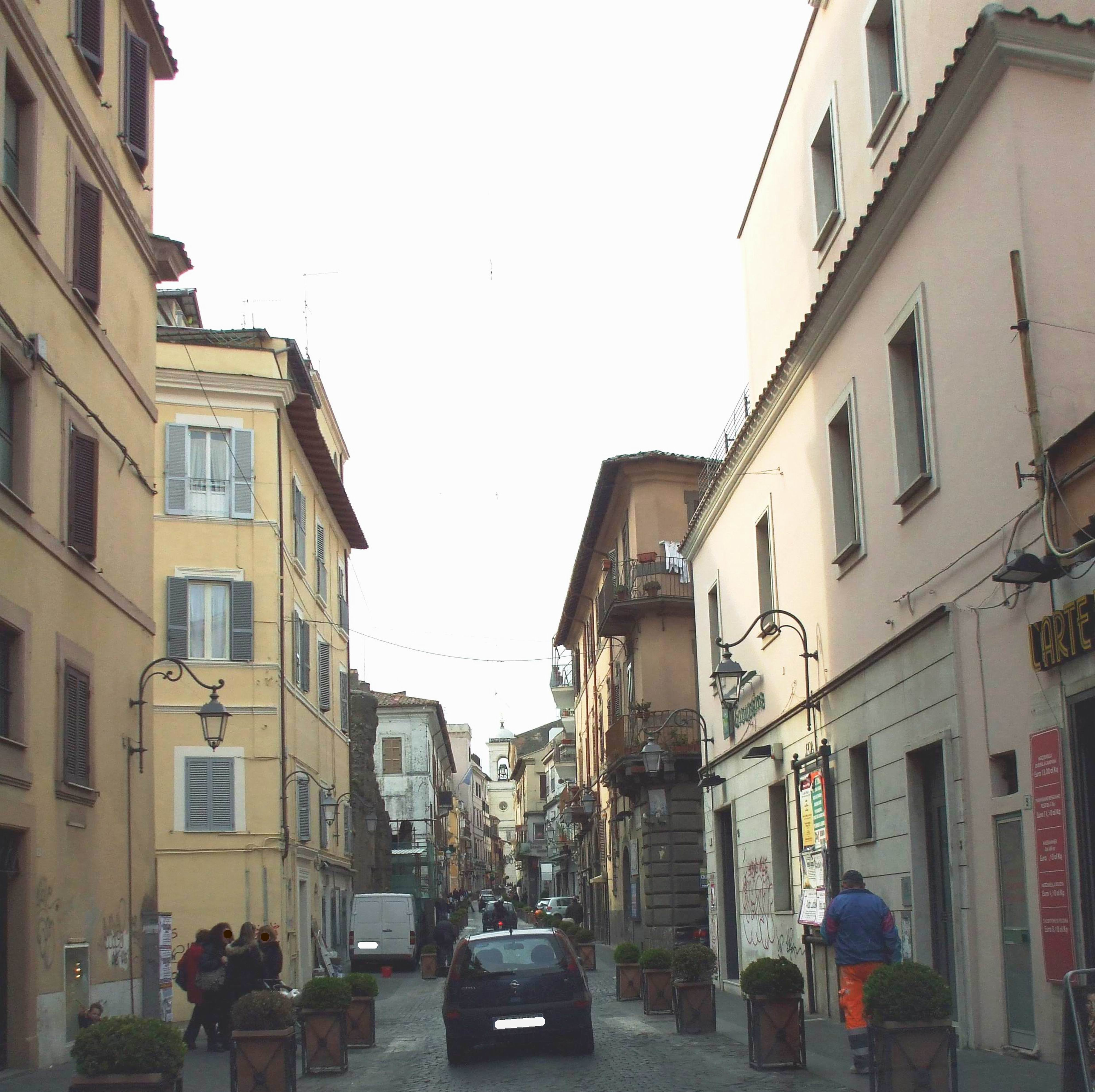 Albano Laziale - il Corso di sopra